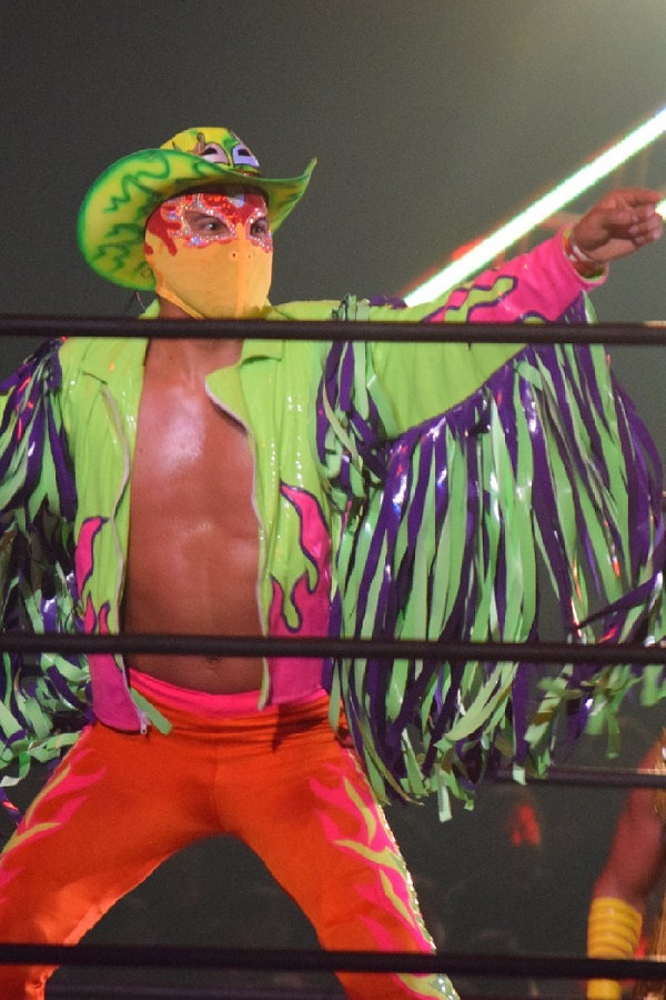 2016年11月5日 大阪府立体育会館「POWER STRUGGLE」 フエゴ